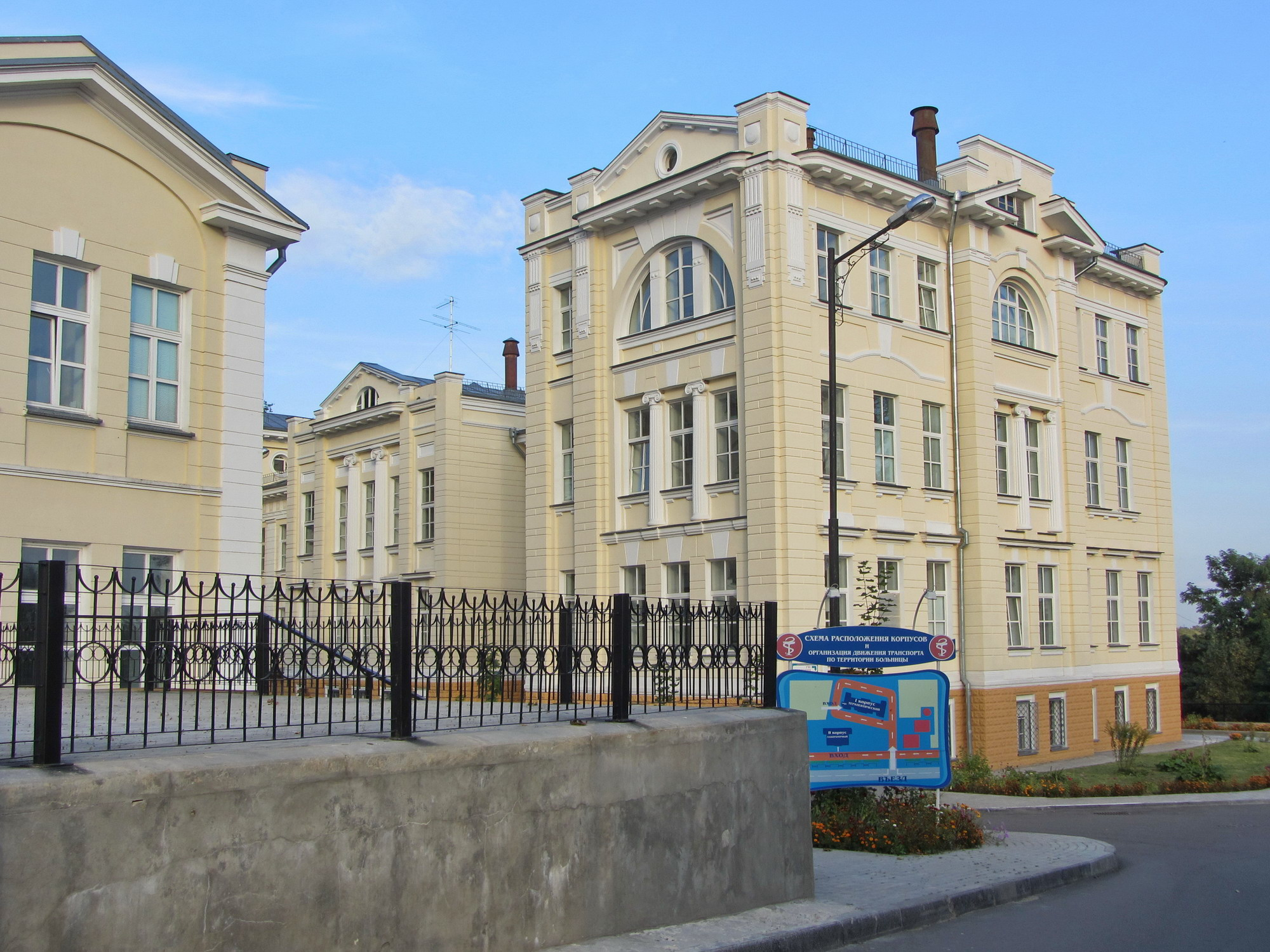 Беларуская (тарашкевіца): Комплекс будынкаў лякарні. г. Гомель This is a photo of Belarusian heritage monument. Reference number: 312ВГ000028 ( WLM)